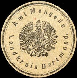 Sealing stamp Title: Amt Mengede - Landkreis Dortmund Description: Briefsiegel, grau, schwarz Place: Mengede size: 3 cm